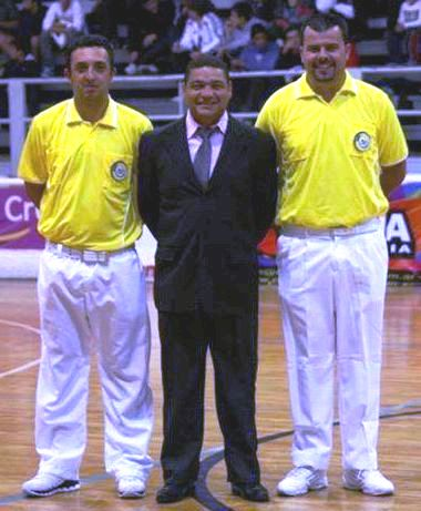 Arbitragem brasileira no Campeonato Sul-Americano de Clubes de Futebol de Salão na Argentina em 2013.